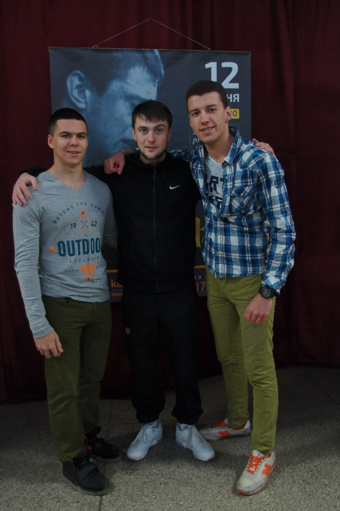 ЯрмаК з фанатами